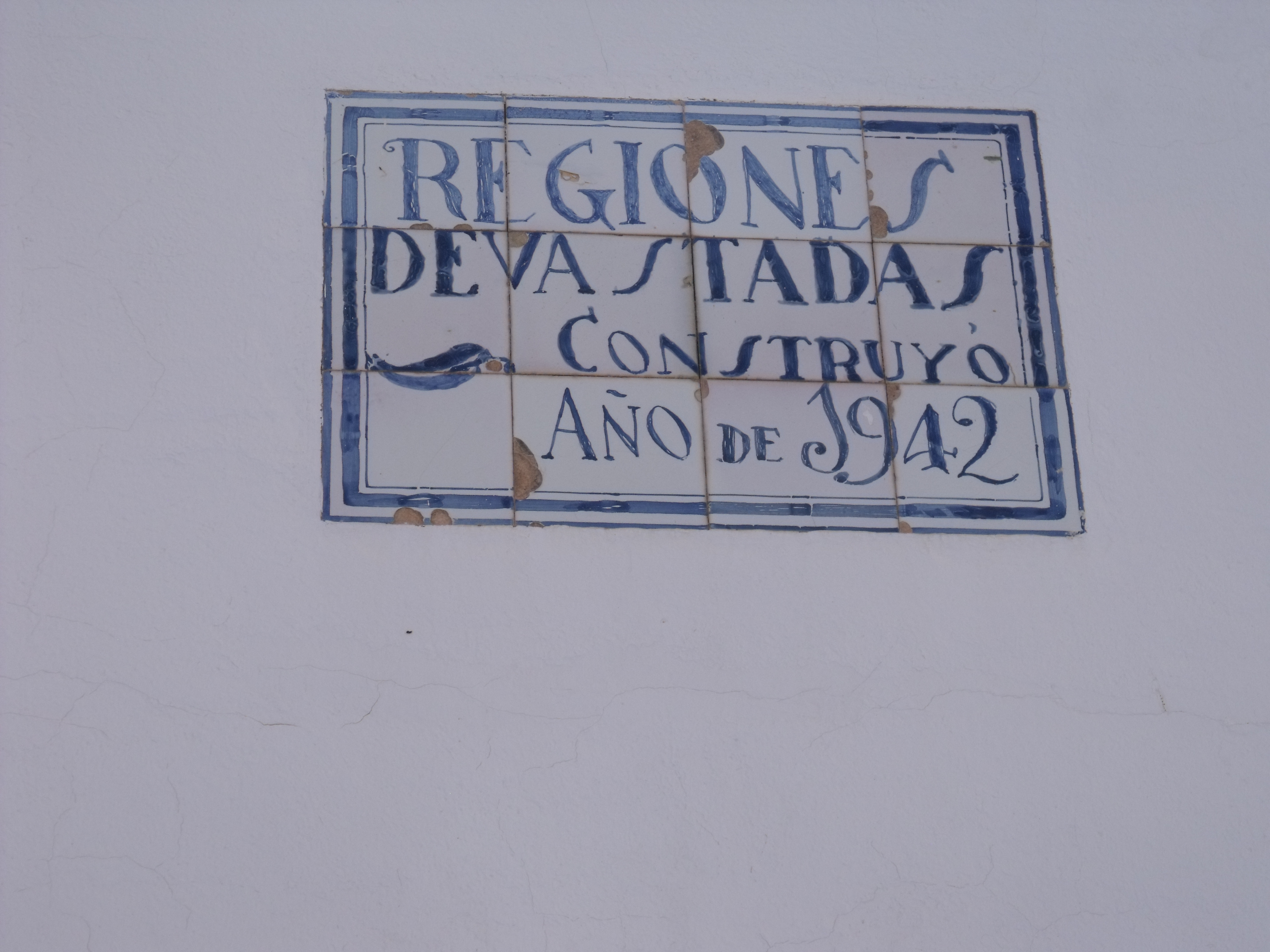 Mascarell. Placa en el Grupo Escolar Luis Vives, construido en 1942 por la Dirección General de Regiones Devastadas y Reparaciones.